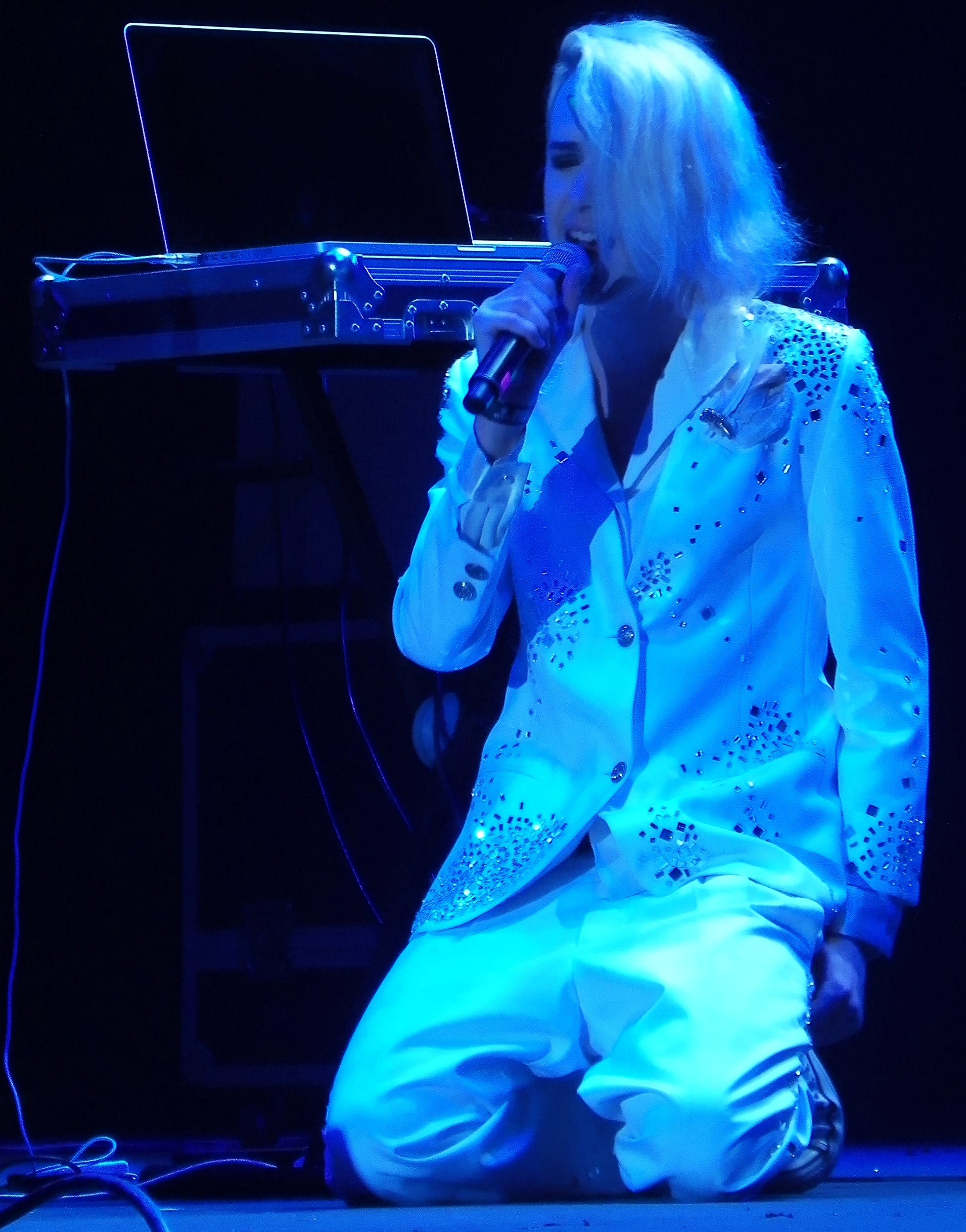 Benito Cerati con Blank Tiger en vivo Teatro de Verano en 2012.